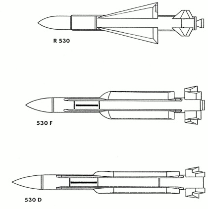 Vue des missiles R350, Super 530 F et Super 530 D View of missiles R530, Super 530 F and Super 530 D